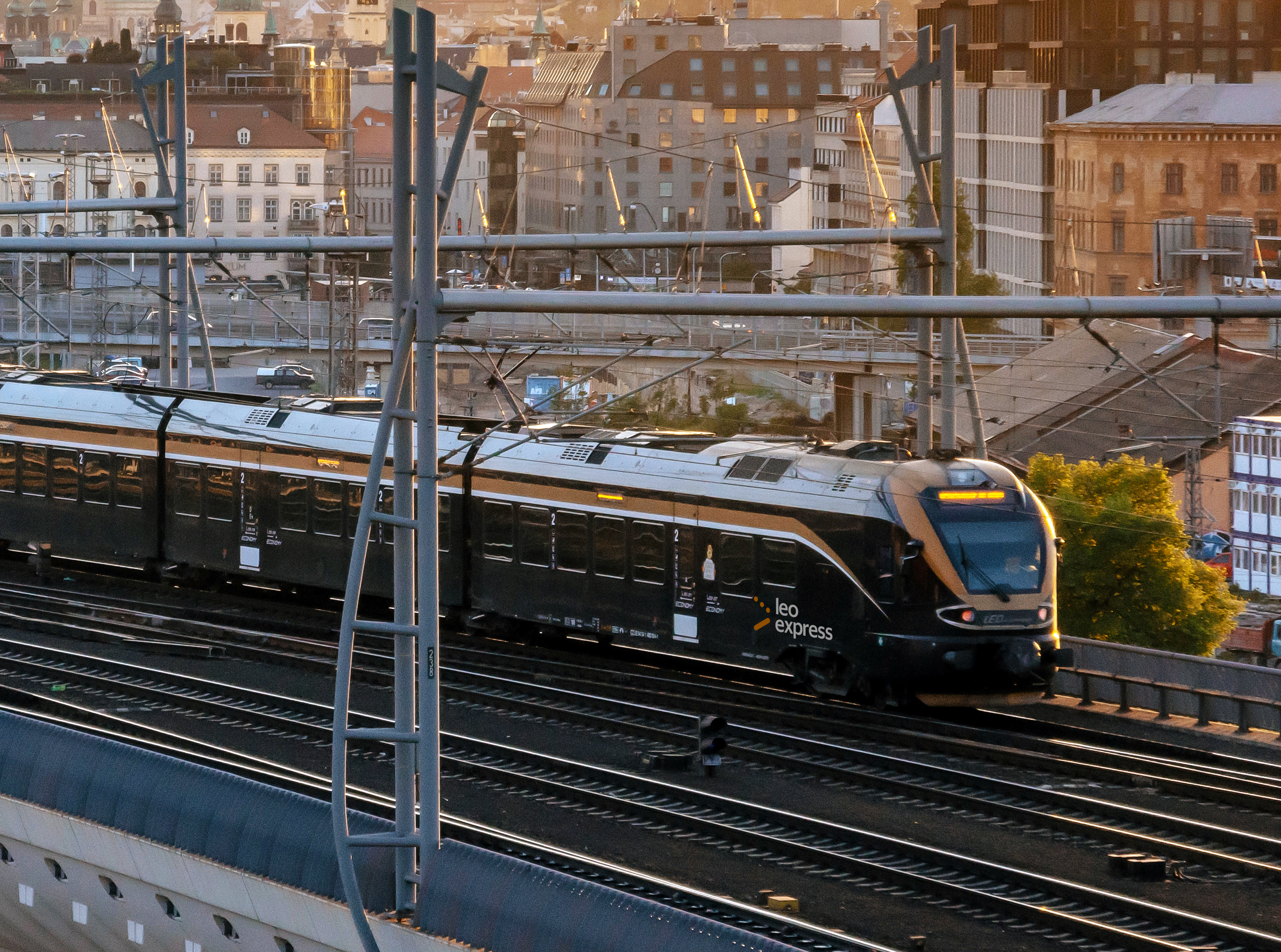 Vlak Stadler Flirt společnosti Leo Express